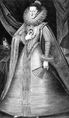 Margherita d'Asburgo, moglie di Filippo III di Spagna